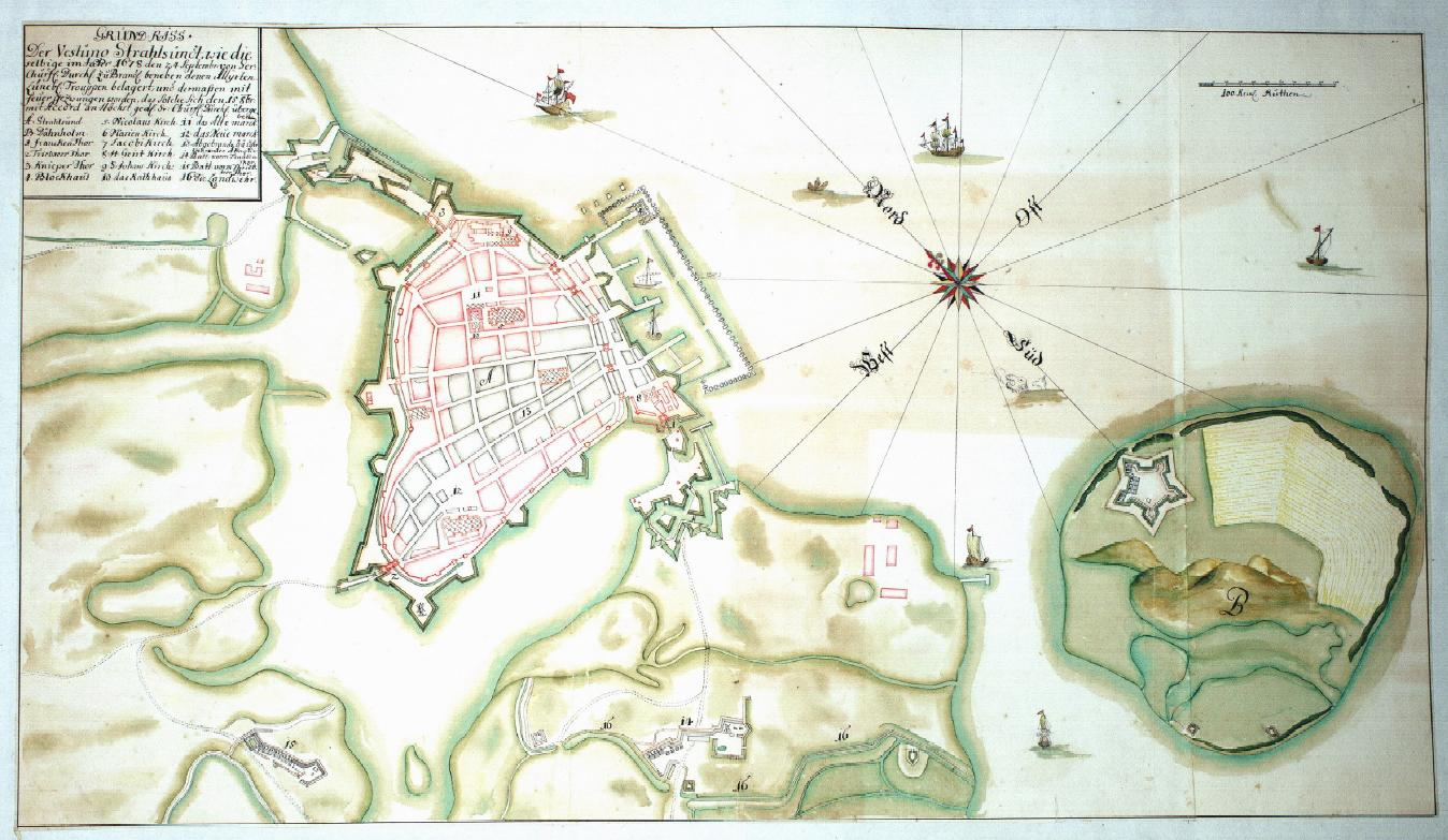 „Grundriß der Vestung Strahlsundt, wie dieselbige im Jahr 1678 den 24. Septembr. von der Churfl. Durch zu Brand. beneben den Aliirten Lüneb. Trouppen belagert und dermaßen mit Feuer gezwungen worden, das solche sich den 15 Octbr. mit Accord an Höchst ged. Sr. Churfl. Durchl. übergeben“ (nach Nordosten ausgerichteter Grundriss der Stadt mit Dänholm mit Legende)